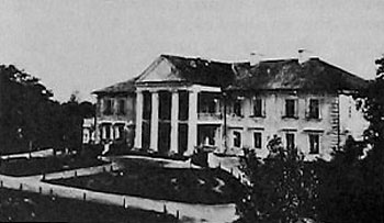 Беларуская (тарашкевіца): Грозаў (Hrozaŭ), палац Мержыеўскіх (Mieržyjeŭski)